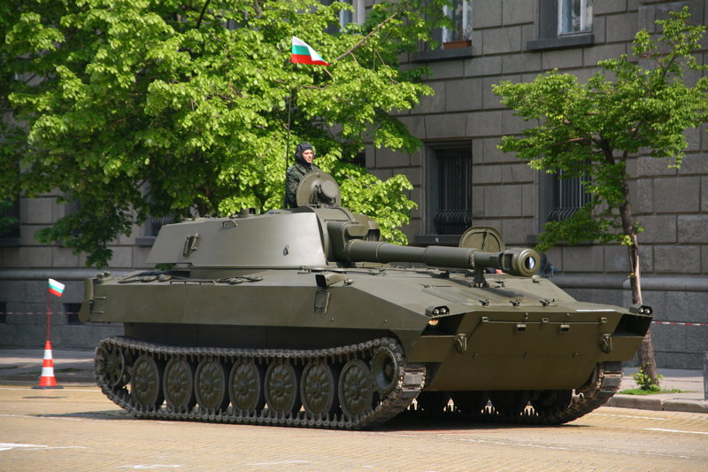 Българска самоходна артилерийска установка 2С1 "Гвоздика" по време на парадът за Гергьовден.